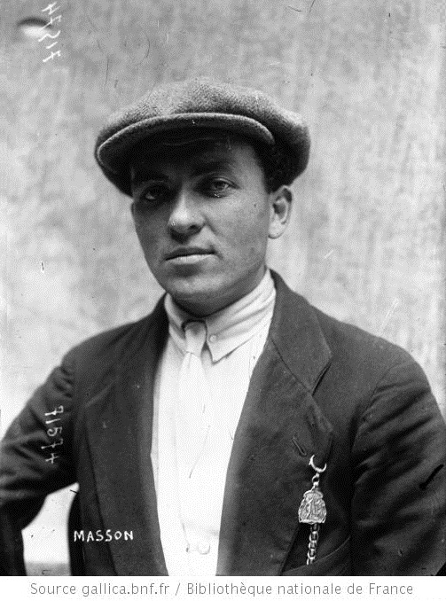 Paris-Roubaix 1919 : Émile Masson senior